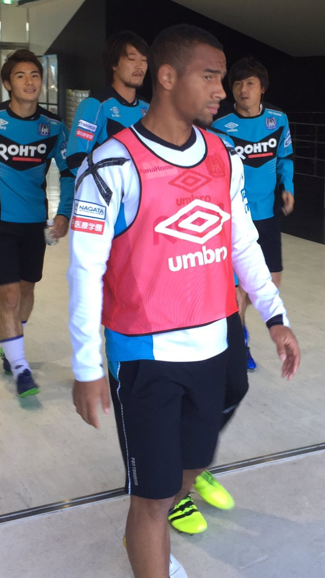 Ademilson con la casacca del Gamba Osaka durante un allenamento, nel 2016